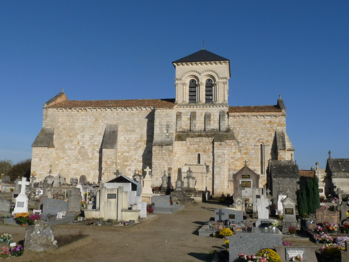 Eglise de Chepniers, Charente-Maritime, France